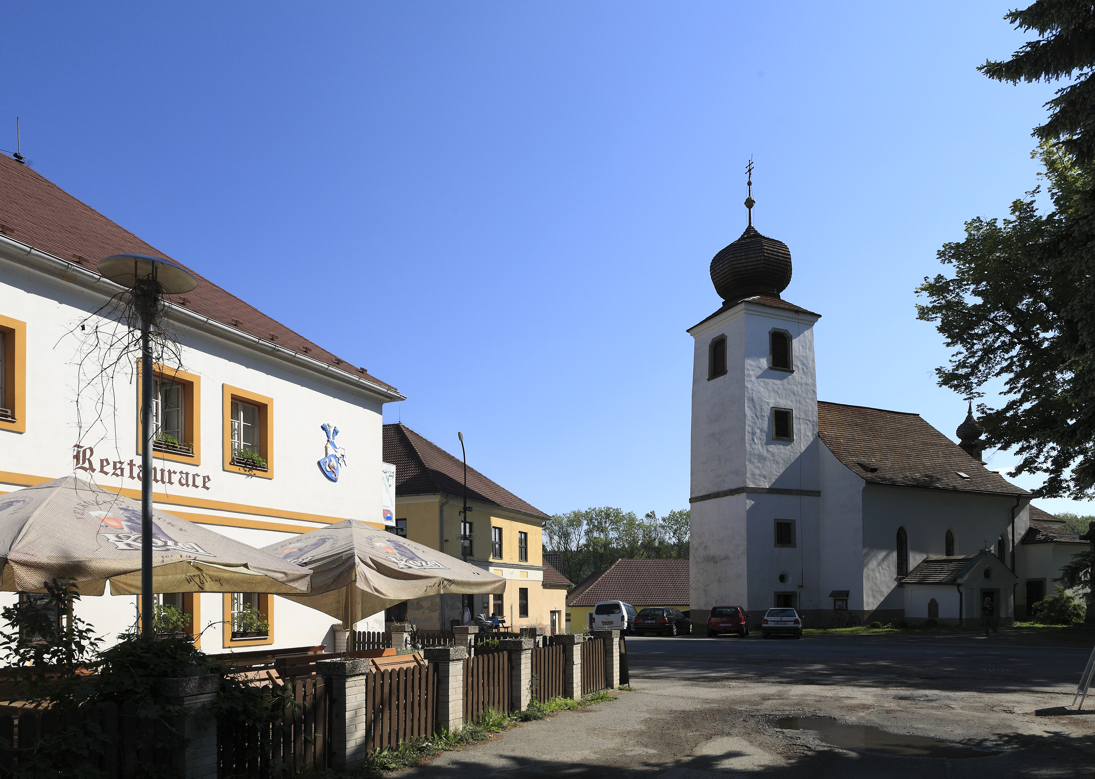 Das klassische Ortszentrum: Gasthof und Kirche (hier Johannes, der Täufer)